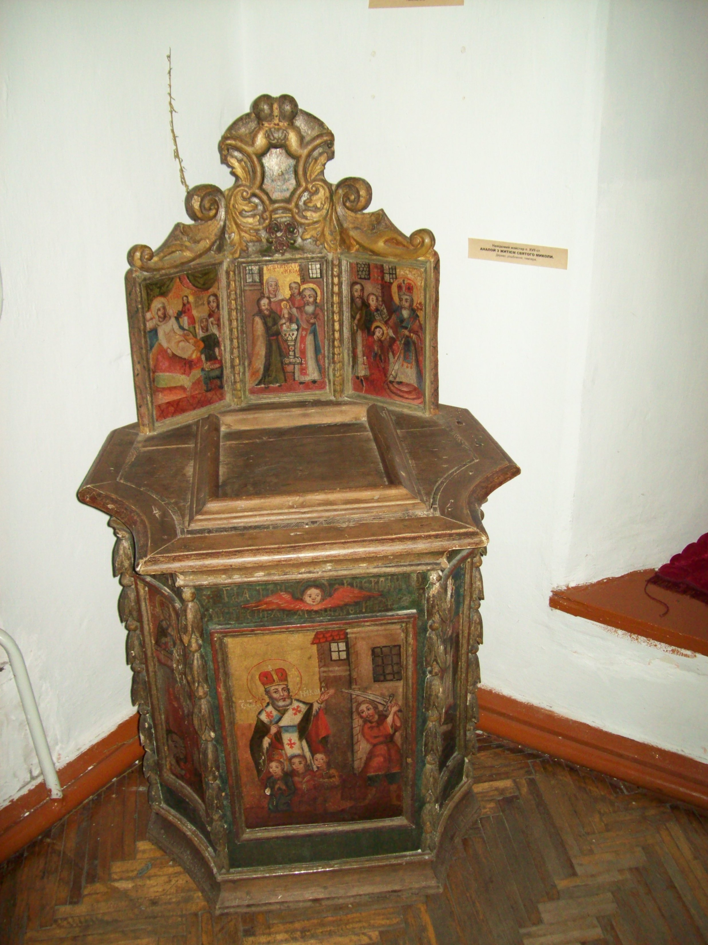 Знято фотоапаратом Kodak у місті Острог, екскурсія до замку.